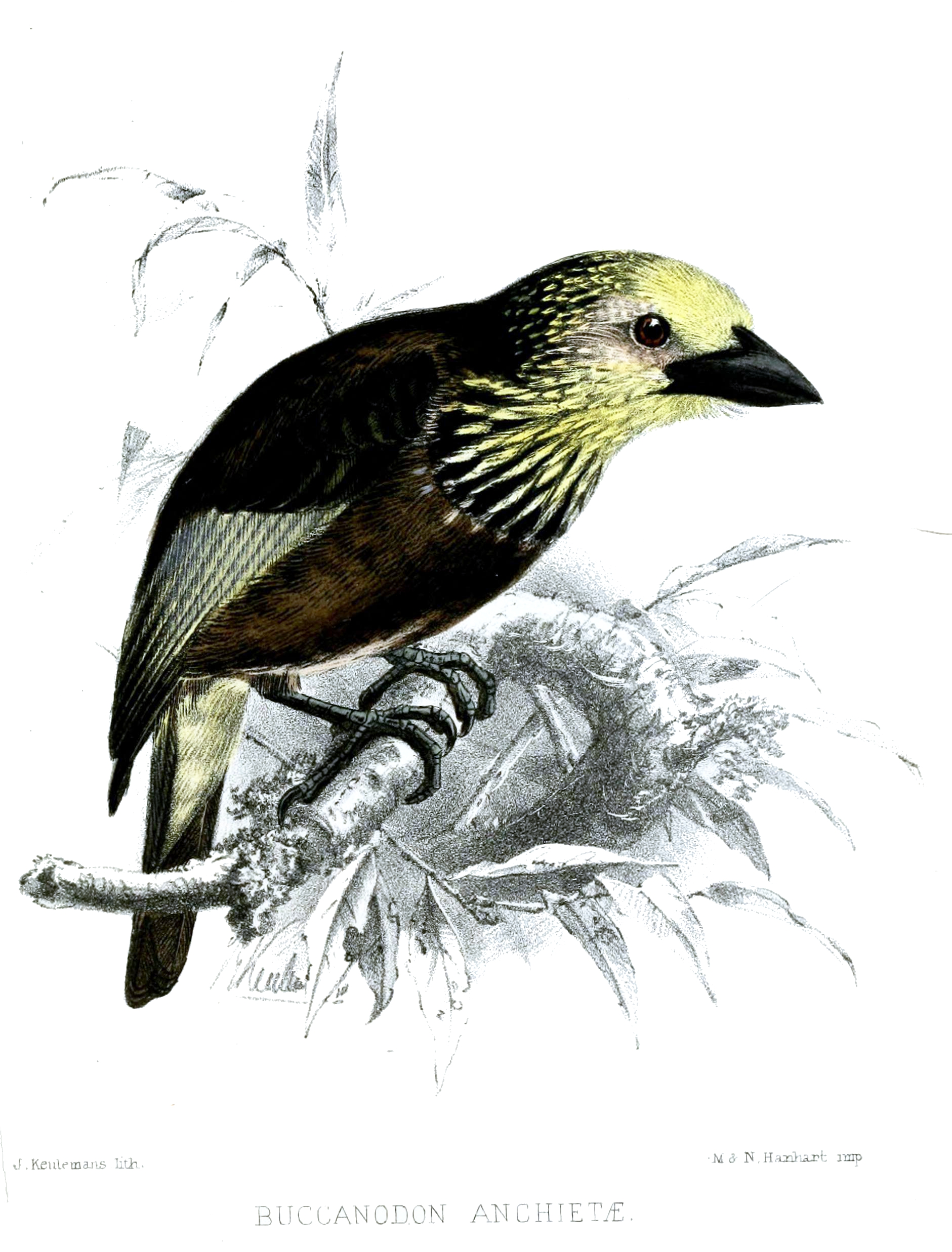 Buccanodon anchietae = Stactolaema anchietae